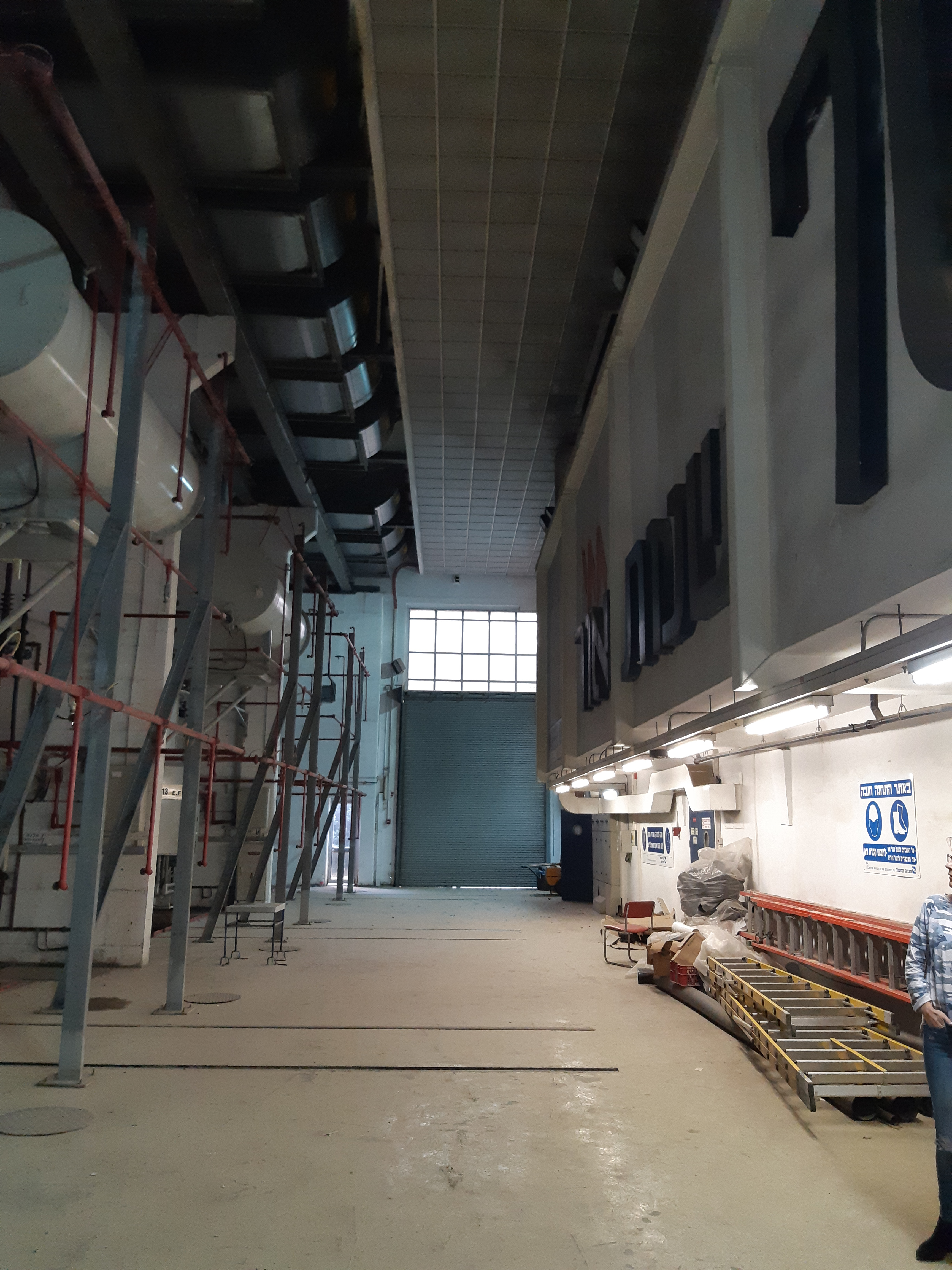 תחנת הכח הישנה של ת"א - מבנה השנאים הראשיים